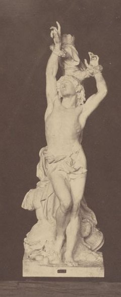 Jean Gautherin: Saint Sébastien, statue, marble